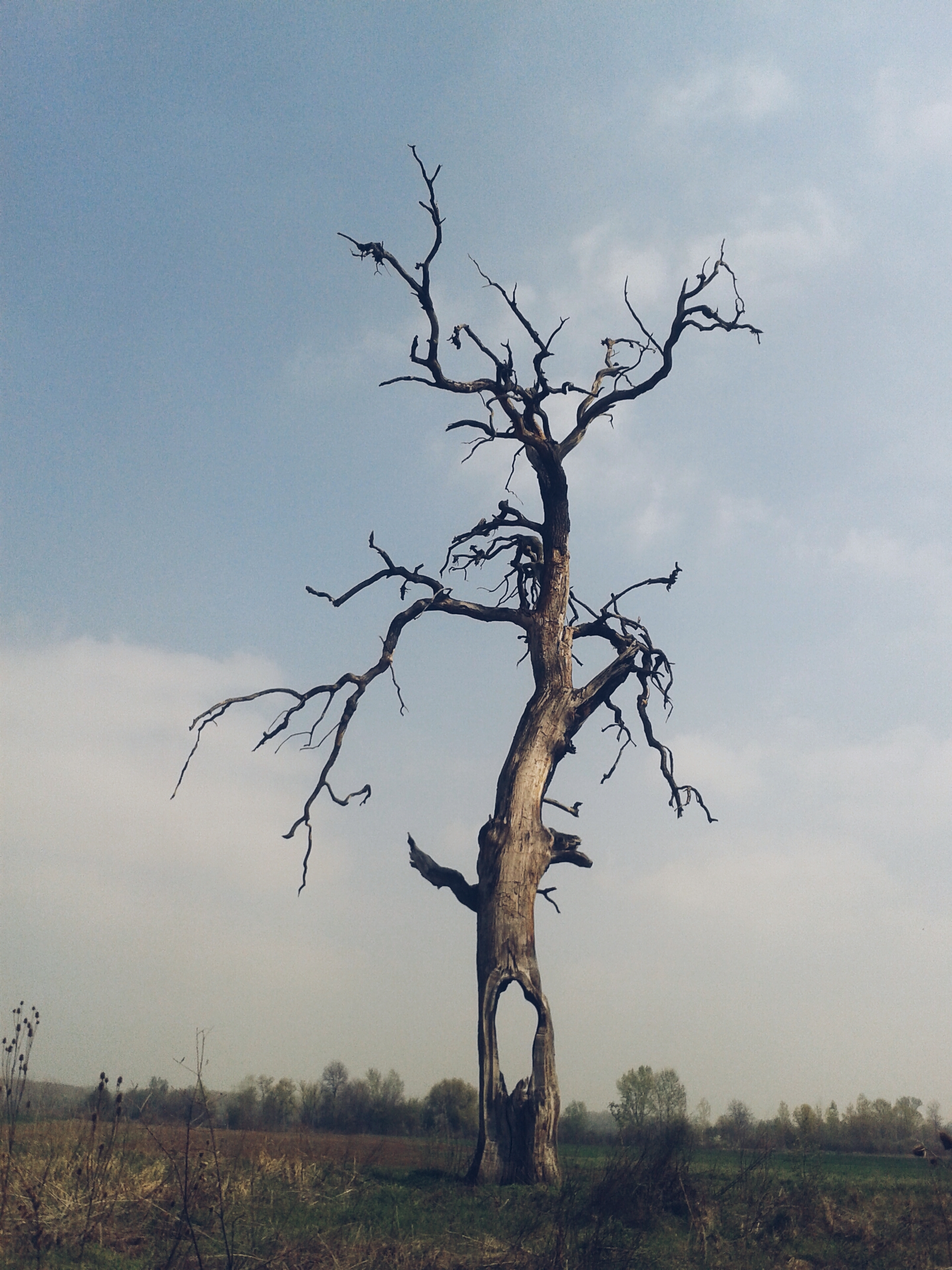 Ово је фотографија заштићеног природног добра у Србији под шифром: СП309This is a a photo of a natural area in Serbia with ID: СП309 Шалиначки луг